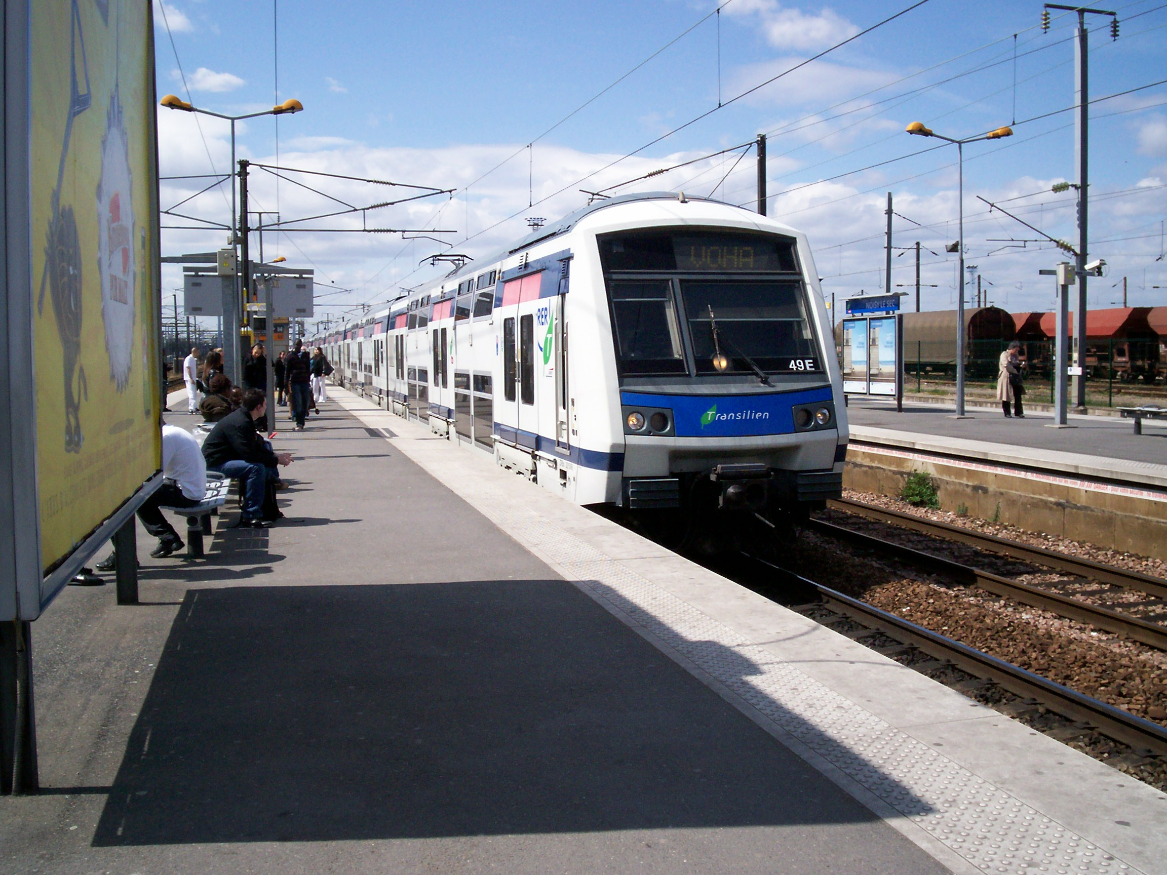 Rame Z22500 à Noisy assurant le code VOHA